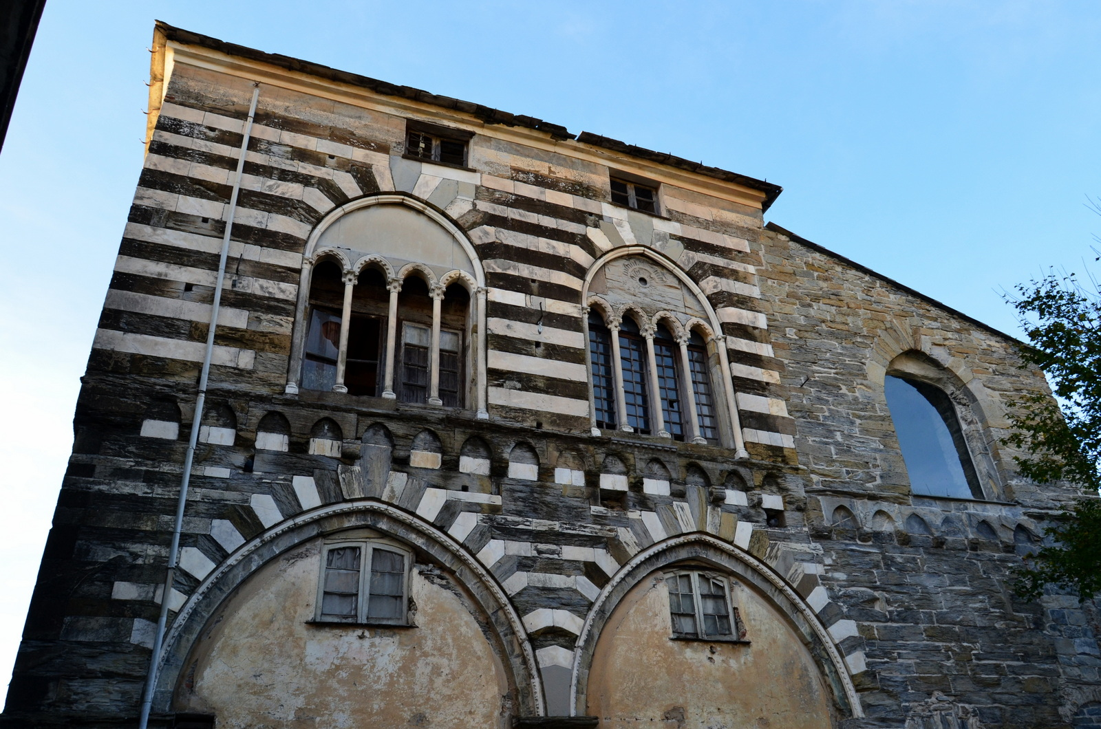 Palazzo comitale dei Conti Fieschi, San Salvatore dei Fieschi, Cogorno, Liguria, Italia